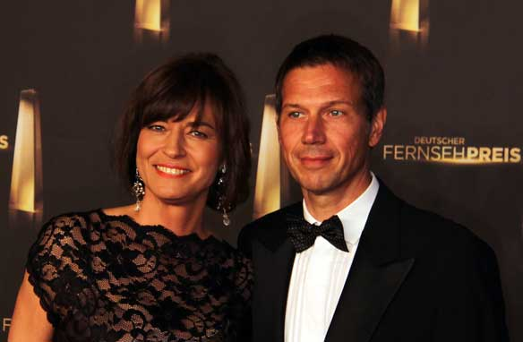 Maybrit Illner und René Obermann beim Deutschen Fernsehpreis 2012